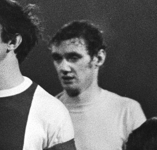 Collectie / Archief : Fotocollectie Anefo Reportage / Serie : Europacup I kwartfinale, voetbalwedstrijd Ajax - Celtic: 3-0 Beschrijving : Spelmoment Datum : 10 maart 1971 Locatie : Amsterdam, Noord-Holland Trefwoorden : scheidsrechters, spelers, sport, voetbal Instellingsnaam : Europa Cup Fotograaf : Fotograaf Onbekend / Anefo Auteursrechthebbende : Nationaal Archief Materiaalsoort : Negatief (zwart/wit) Nummer archiefinventaris : bekijk toegang 2.24.01.05 Bestanddeelnummer : 924-3470